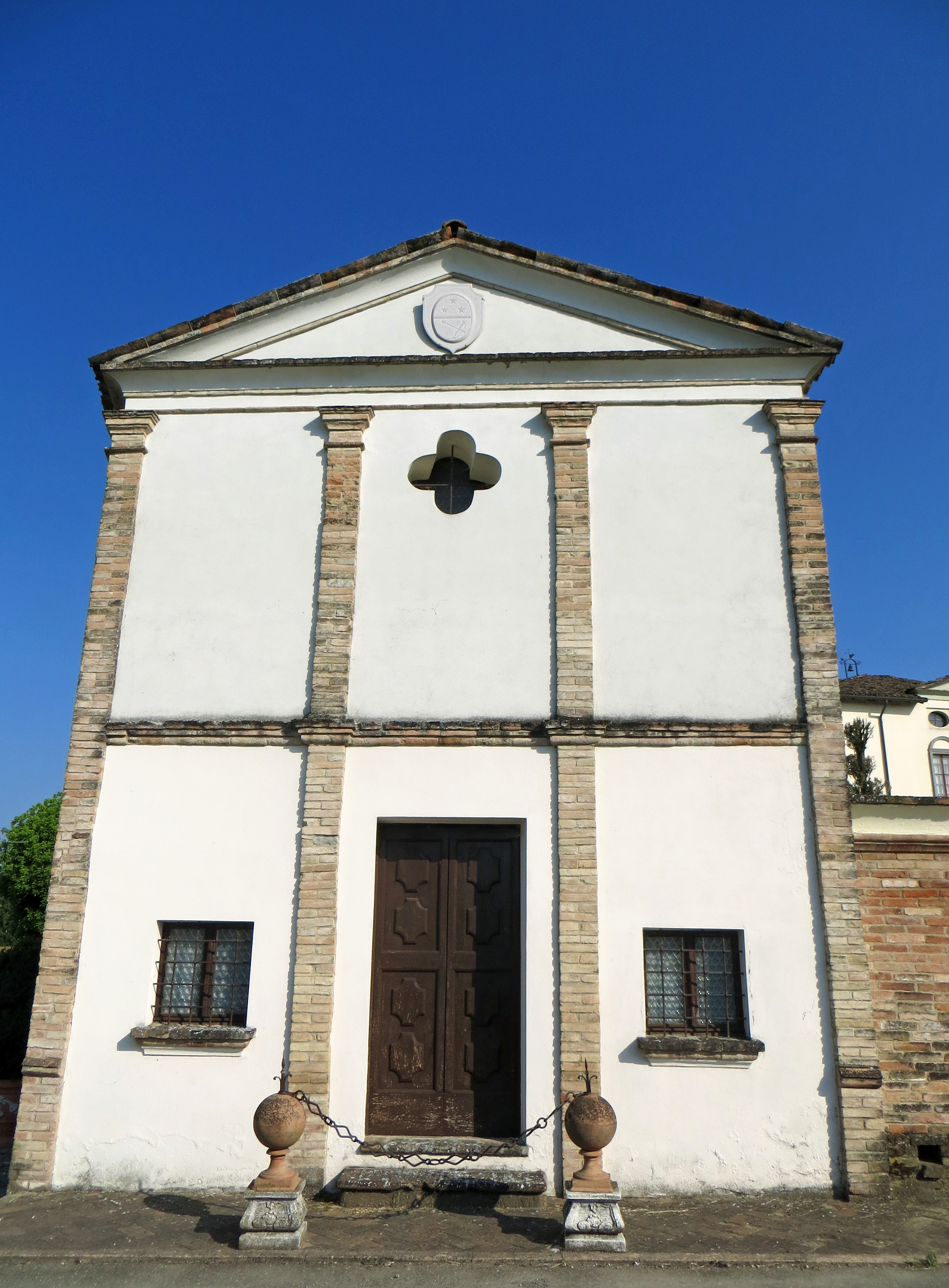 Villa Lanfranchi (Santa Maria del Piano, Lesignano de' Bagni) - oratorio di Santa Maria Maddalena